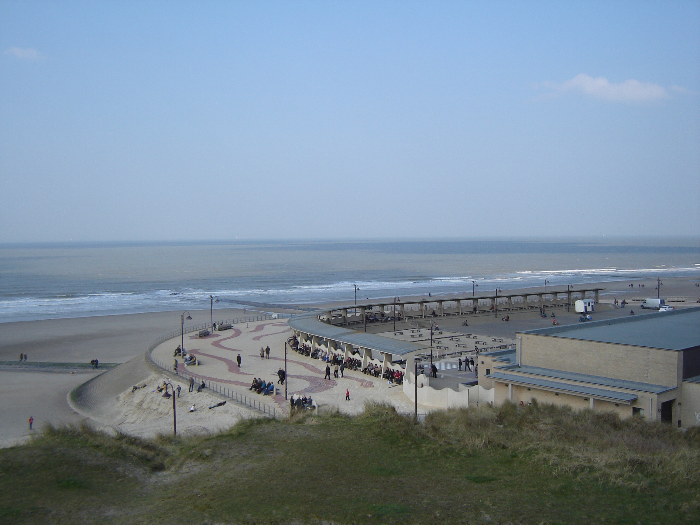 Zeedijk en strand van Wenduine aan de Noordzee Seawall and beach of Wenduine, on the North Sea. Wenduine, De Haan, West Flanders, Belgium